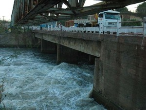 Barragem do Bacanga em São Luís (Foto: Flora Dolores/O Estado)